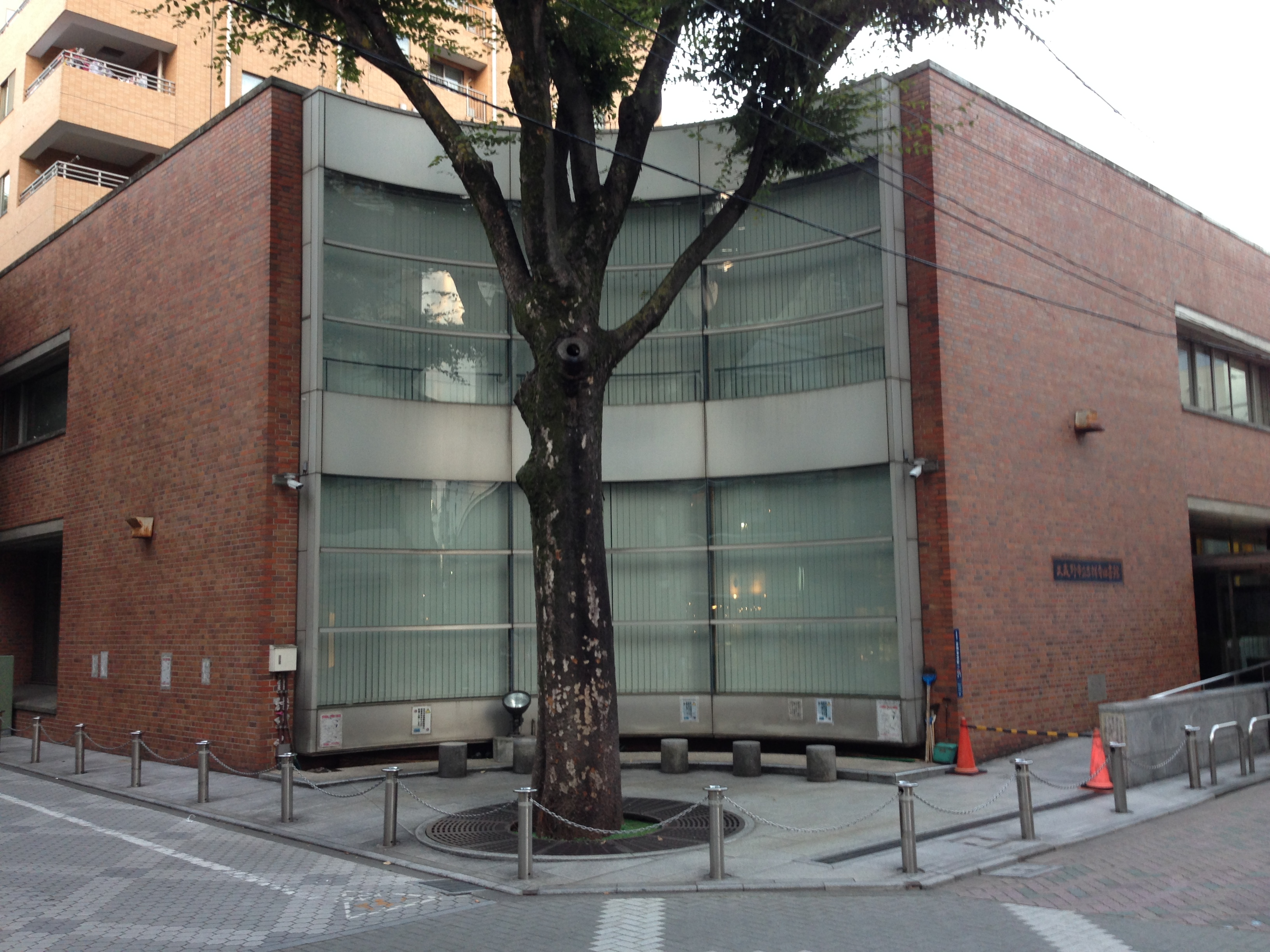 武蔵野市立吉祥寺図書館（東京都武蔵野市）